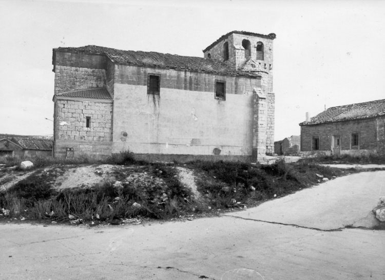 Iglesia parroquial de San Pedro Apóstol - Olmos de Esgueva (Valladolid) - Álbum 200 x 140 - Fotografía. Papel 120 x 90 B/N